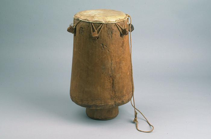 Slaginstrument. Enkelvellige conische trom Unknown language: Apinti